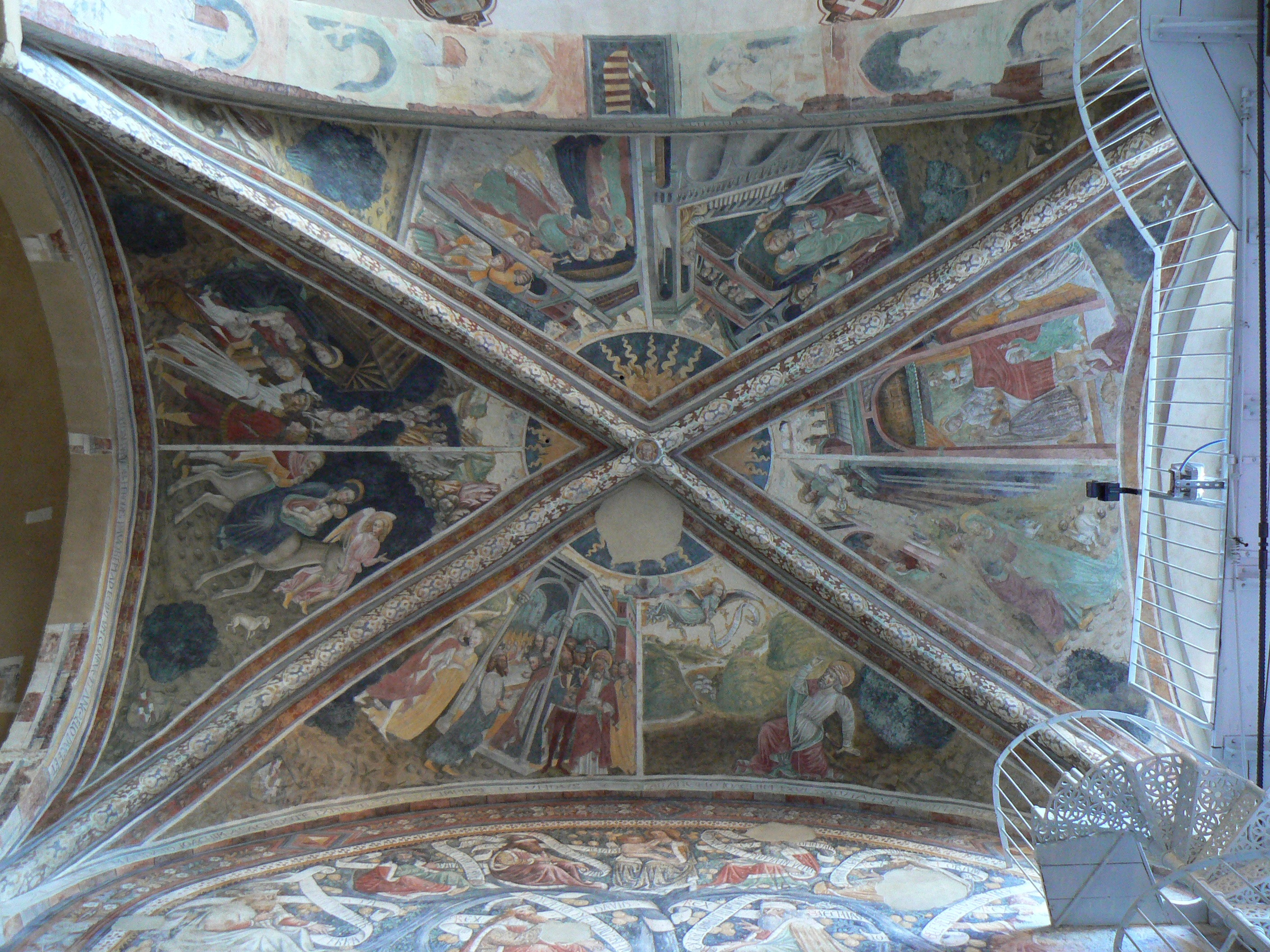 Interno ex Chiesa San Marco, ARCA, Vercelli. This is a photo of a monument which is part of cultural heritage of Italy.